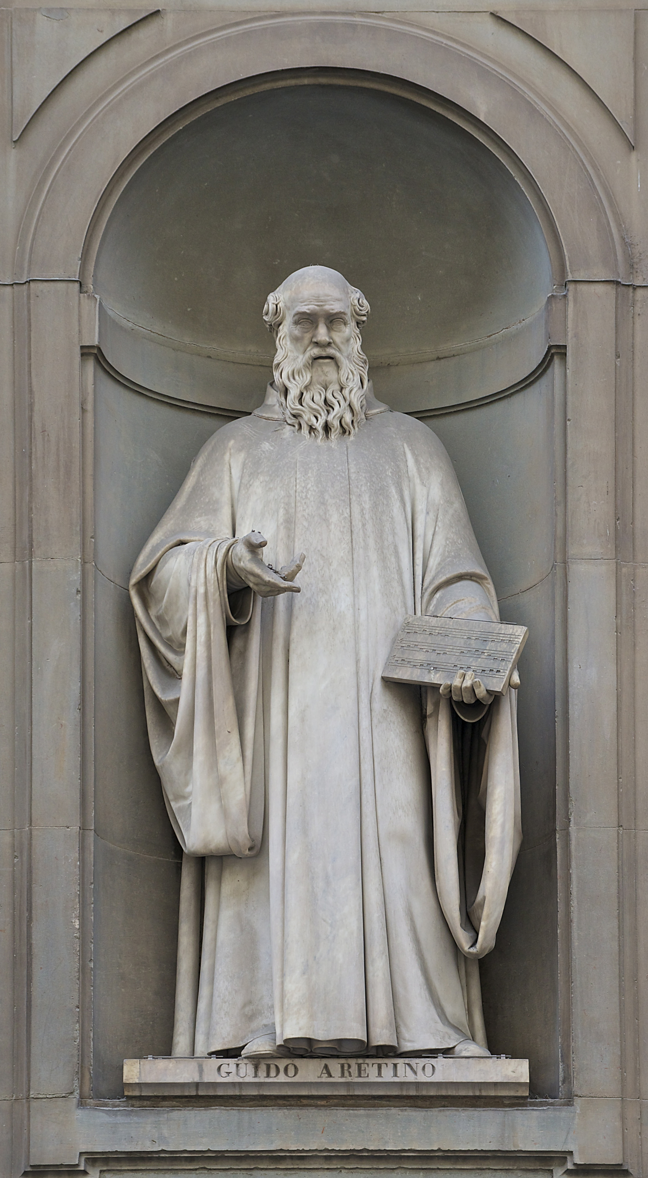 Statue de Guido d'Arezzo (Guy l'Arétin) au Piazzale des Offices, à Florence, Italie. Par Lorenzo Nencini.